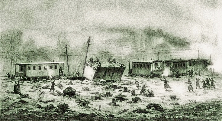 Attacco al convoglio dello zar Alessandro II sulla linea ferroviaria Mosca-Kursk compiuto dal partito della Narodnaja volja il 19 novembre (1º dicembre) 1879